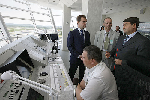 Дмитрий Медведев на открытии новой башни командно-диспетчерского пункта в международном аэропорту «Кольцово», Екатеринбург, 15 июня 2009 года.